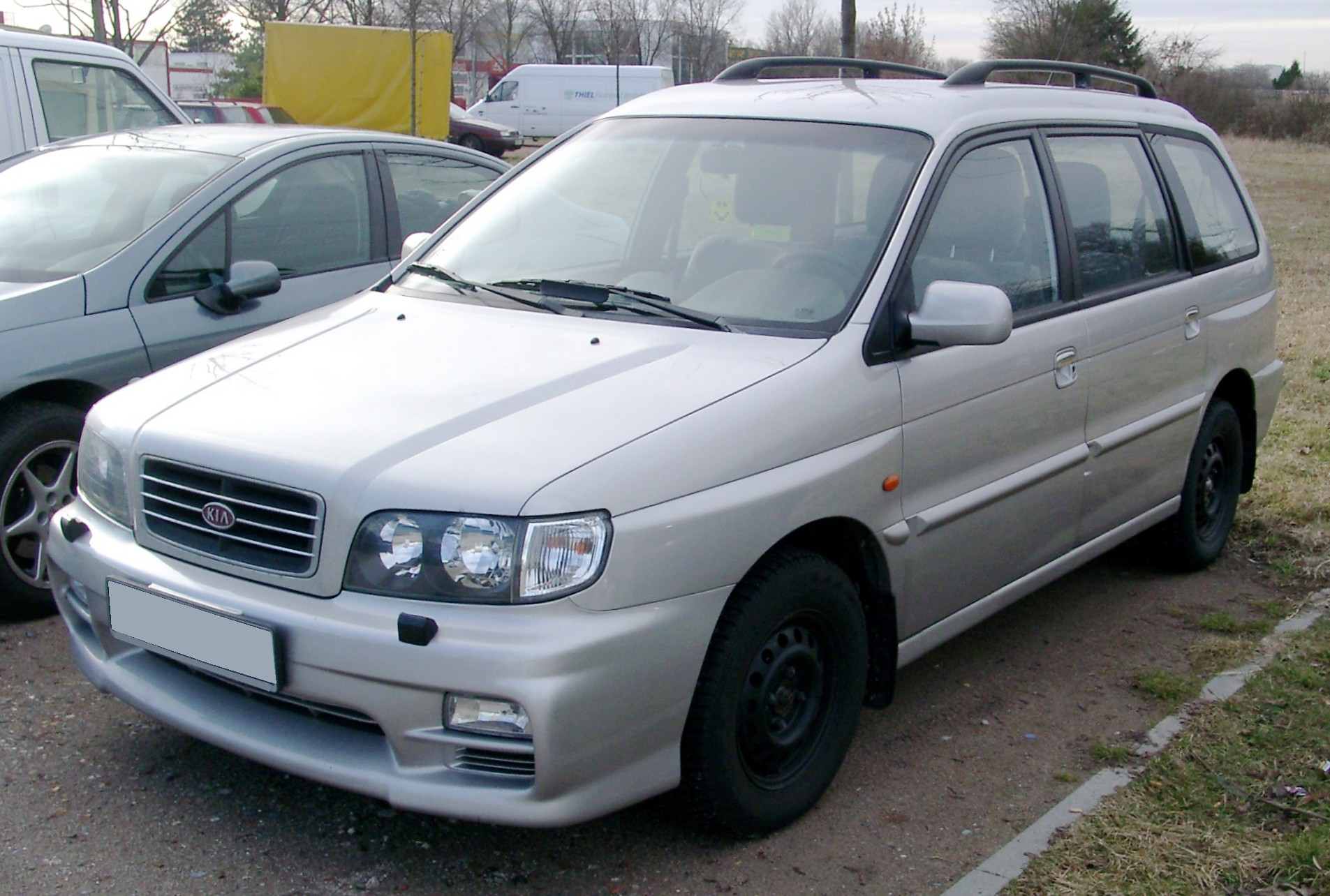 Kia Joice